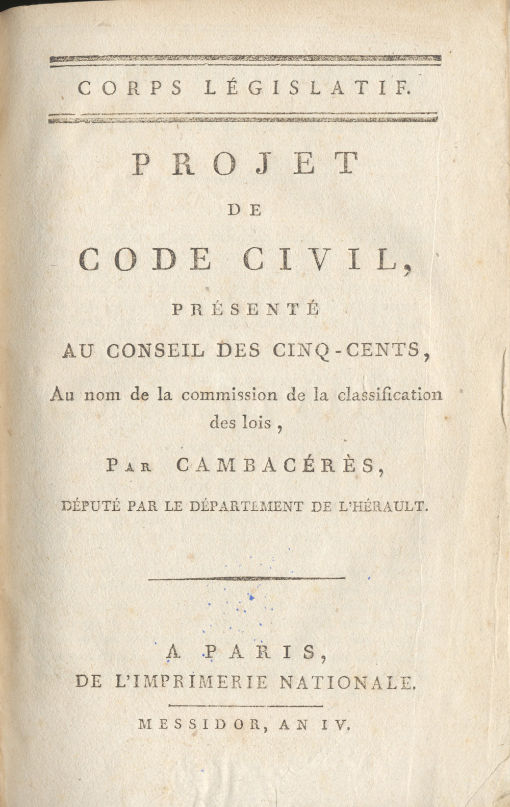 Projet de Code civil, présenté au Conseil des Cinq-Cents